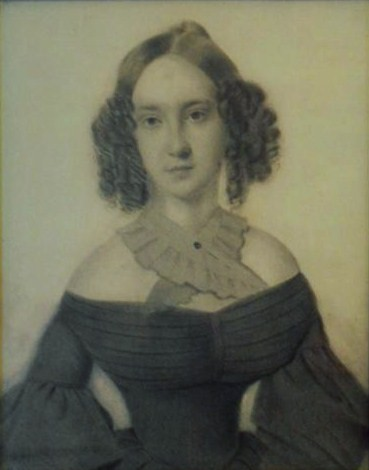 Софья Львовна Путятина, ур. Энгельгардт ((1811—1884)